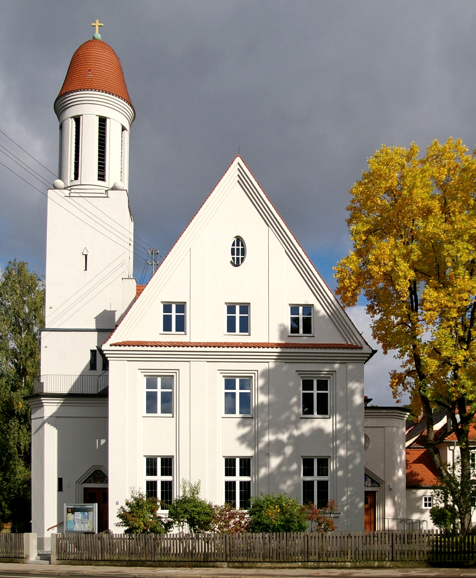 Evang.-Luth. Dreifaltigkeitskirche in Augsburg-GöggingenThis is a photograph of an architectural monument.